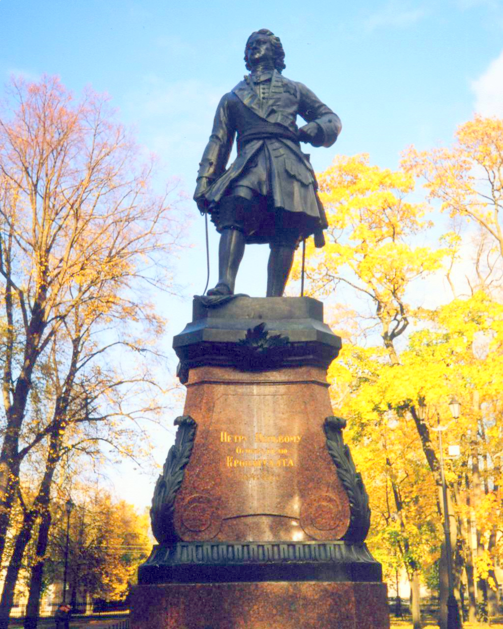 Памятник Петру I, Кронштадт, Россия